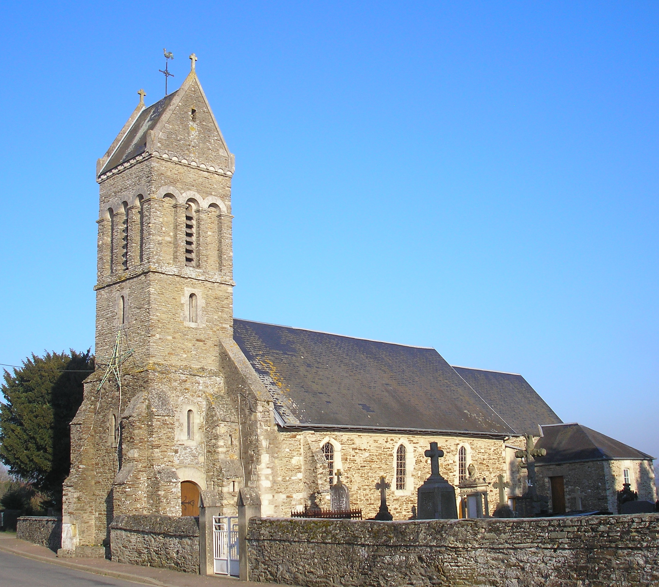 Feuguerolles-sur-Seulles (Normandie, France). L'église Saint-Pierre